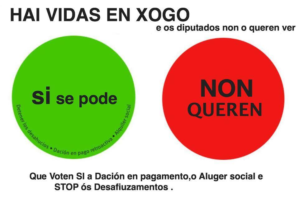 Sociedade: os de "Stop Desafiuzamentos" están a facer unha "campaña de escrache e sinalamento dos culpables e cómplices"